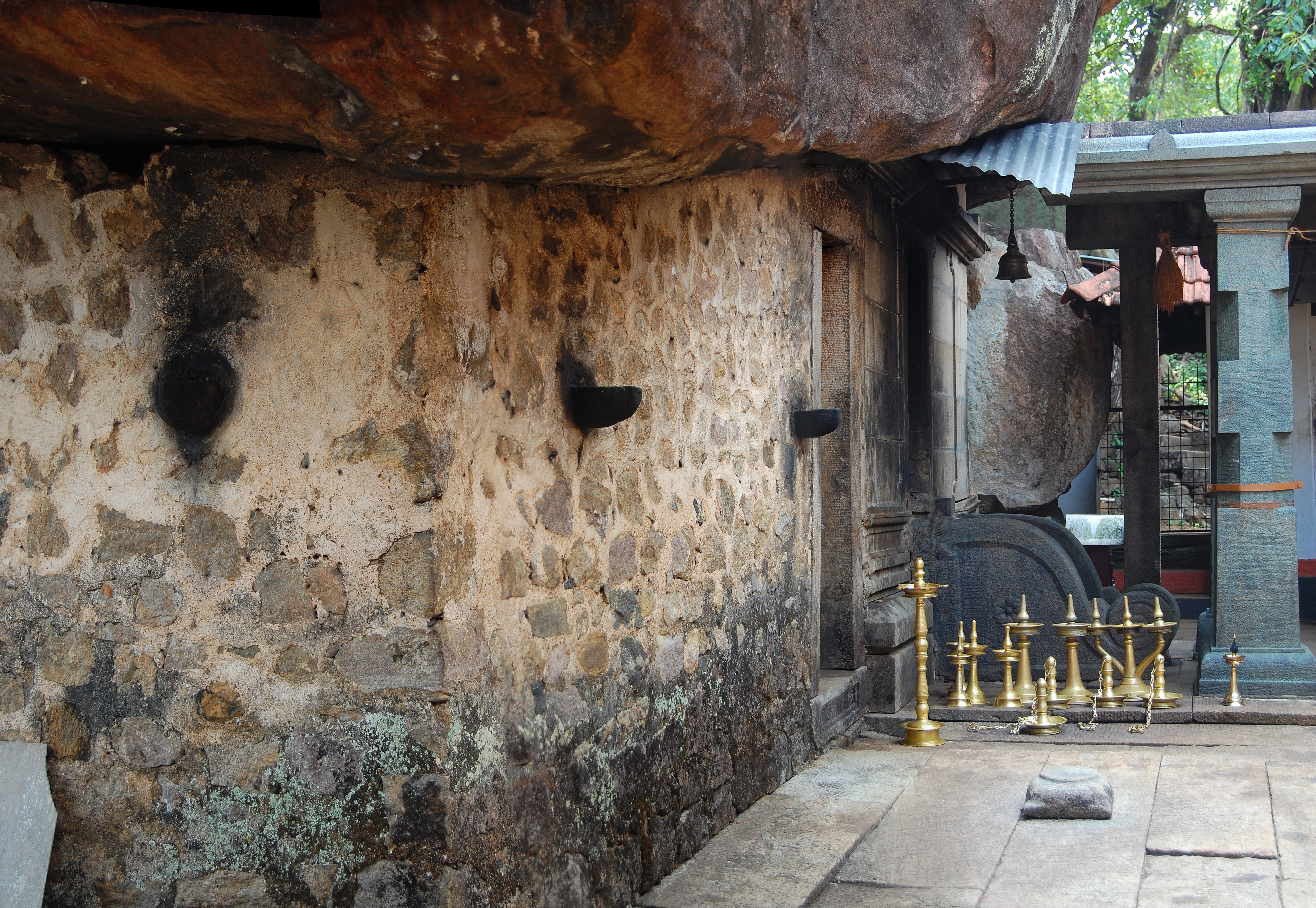 കല്ലിൽ ഭഗവതിക്ഷേത്രം. പെരുമ്പാവൂർ; മേതല